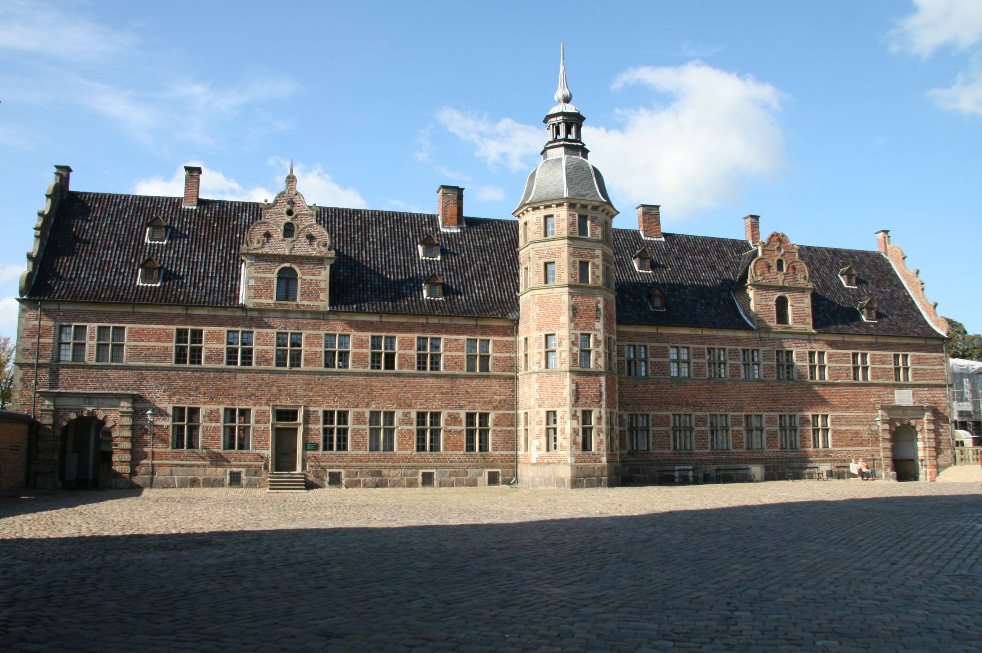 Frederiksborg Slot, Hillerød, Denmark. Outer courtyard